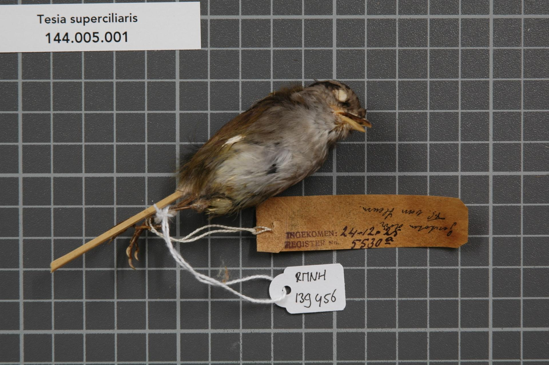 Tesia superciliaris (Bonaparte, 1850)